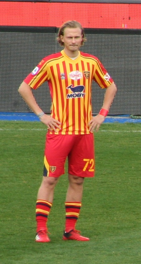 Calcio di inizio della partita Lecce-Atalanta, disputata a Lecce il 1° marzo 2020